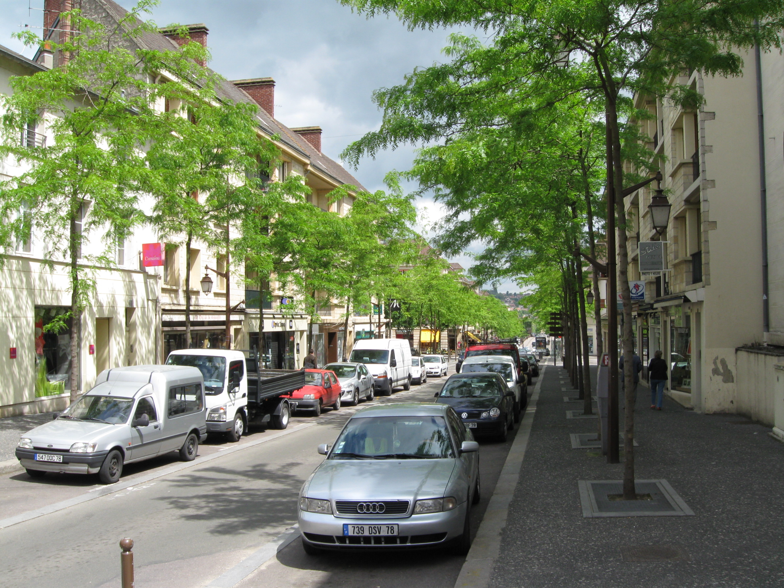 Rue Nationale, Mantes-la-Jolie